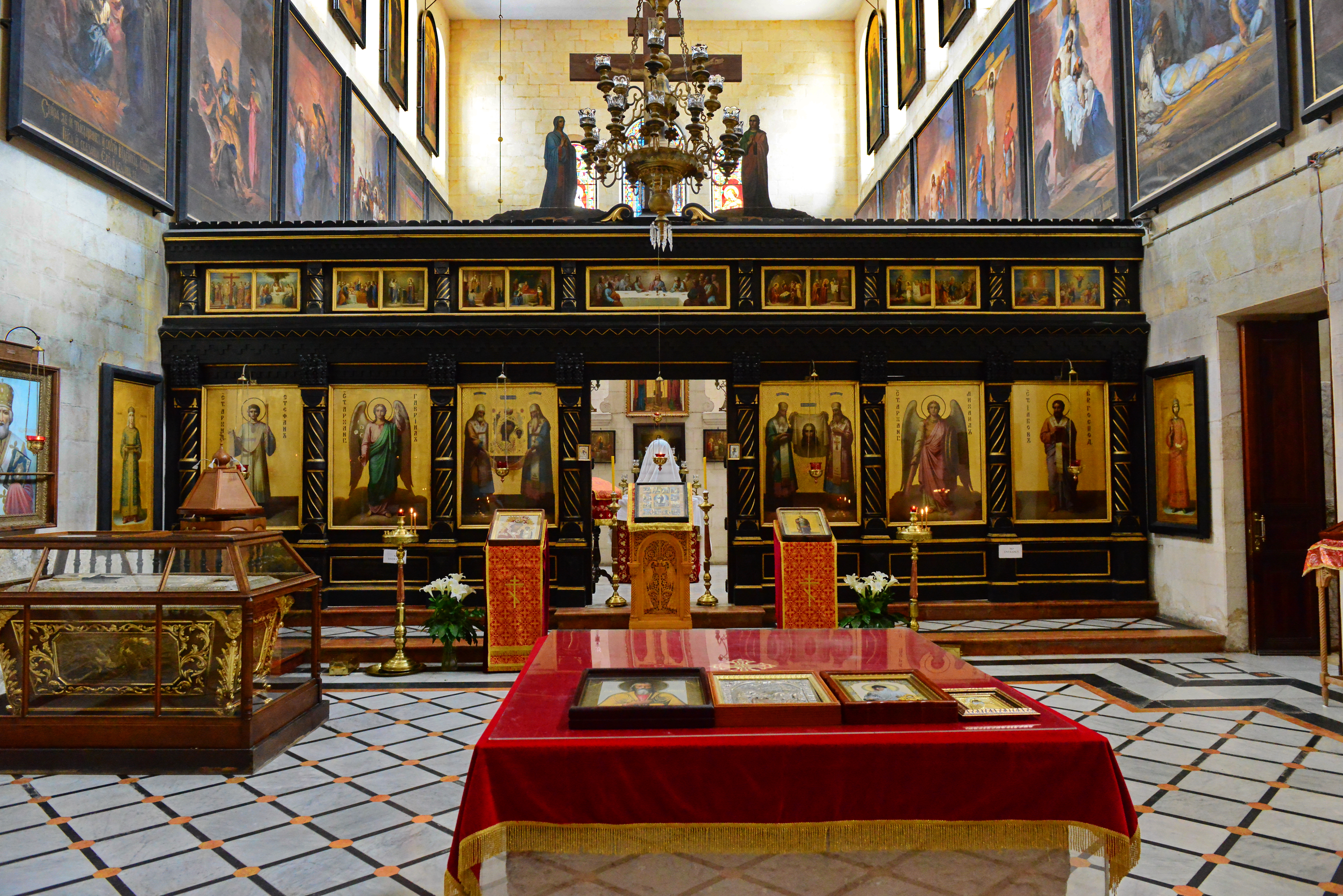 כנסיית אלכסנדר נבסקי, מנזר וכנסייה הנמצאים ברובע הנוצרי של העיר העתיקה בירושלים, במרחק כמה עשרות מטרים מכנסיית הקבר ומול הכניסה הצפונית לכנסיית הגואל.